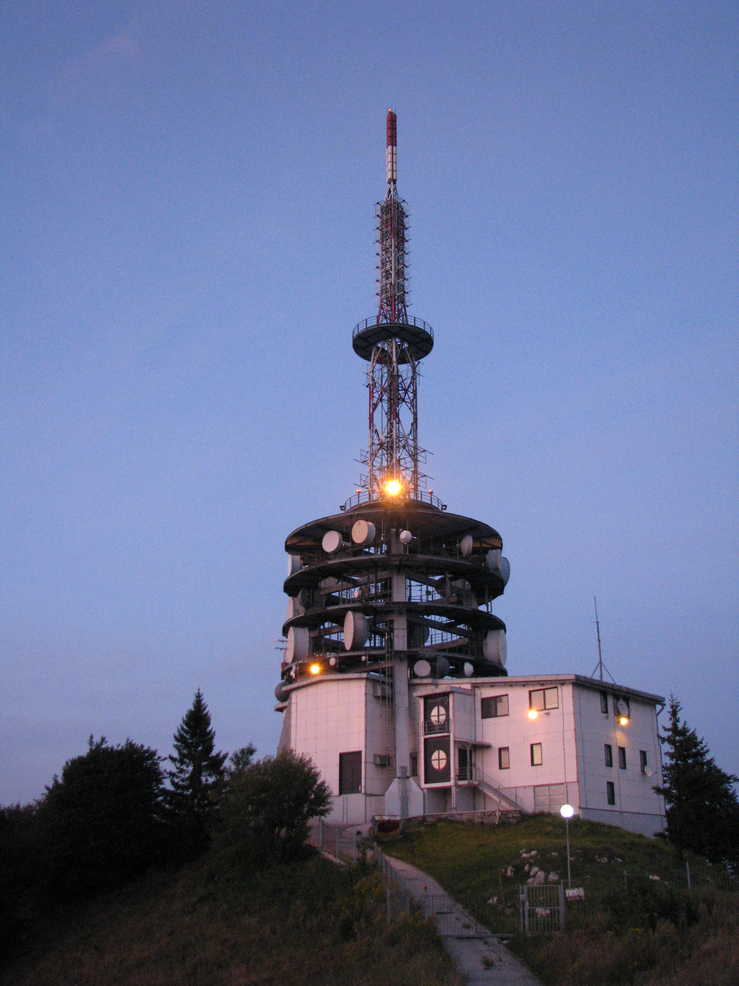 Oddajnik na Kumu